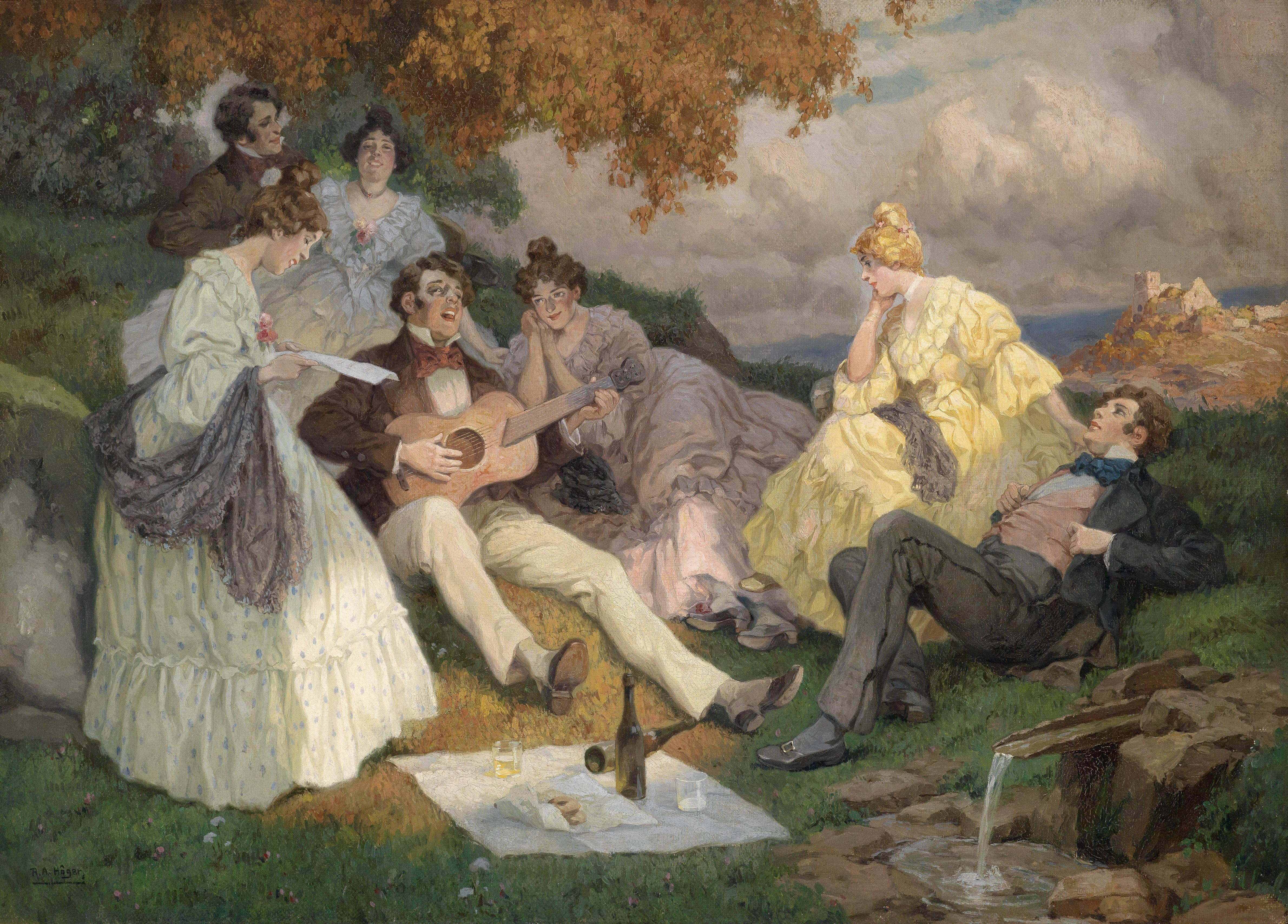 Fröhliche Sangesrunde mit einer Donaulandschaft (Wachau?) im Hintergrund